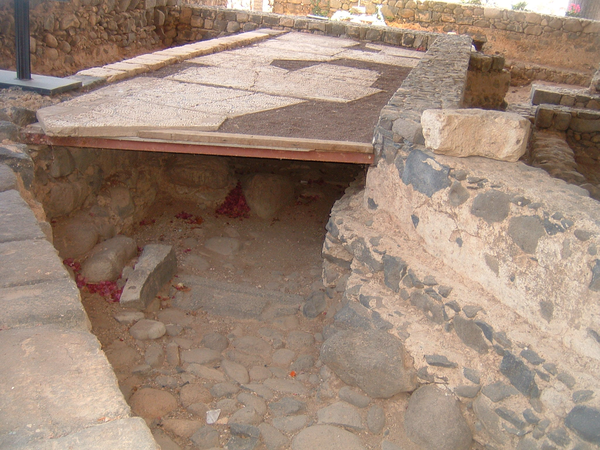 Foto scattata da me il 13 giugno 2008 Resti della casa di Pietro a Cafarnao